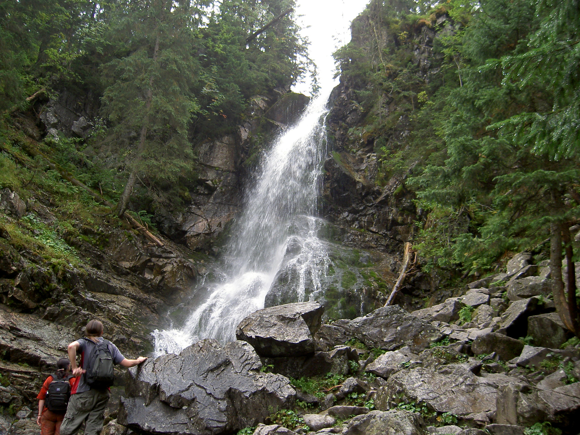 Roháčský vodopád